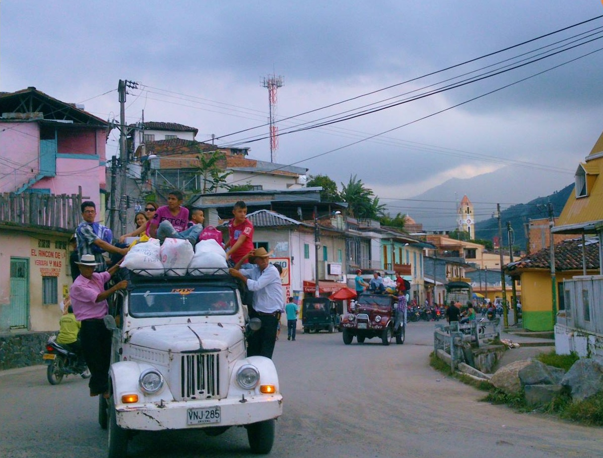 Carpati Belumbrense, vehículo tradicional en las veredas de belén de umbría, fotografia William Andres Ramirez Molina